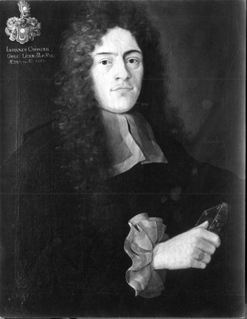 Johann Osiander; Gemälde der Professorengalerie der Eberhard Karls Universität Tübingen; Öl auf Leinwand, 68,5 cm x 53,2 cm